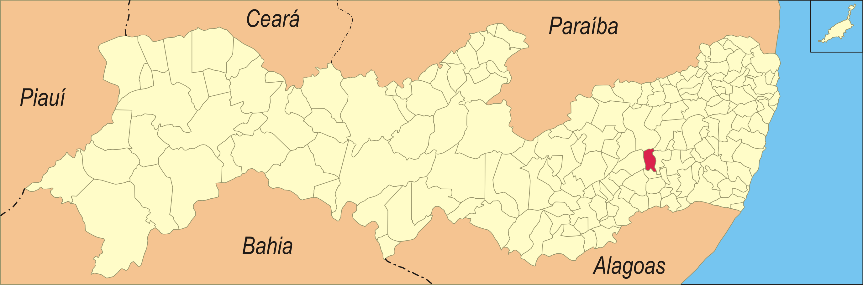 Localização da cidade no estado de Pernambuco